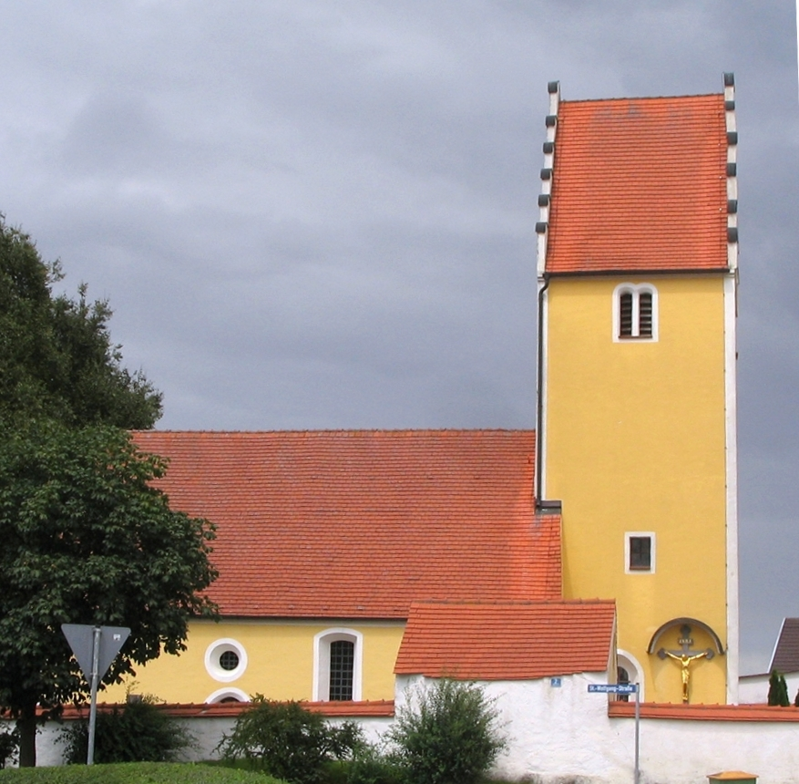 Neustadt an der Donau, Ortsteil Arresting: Kirche St. Wolfgang